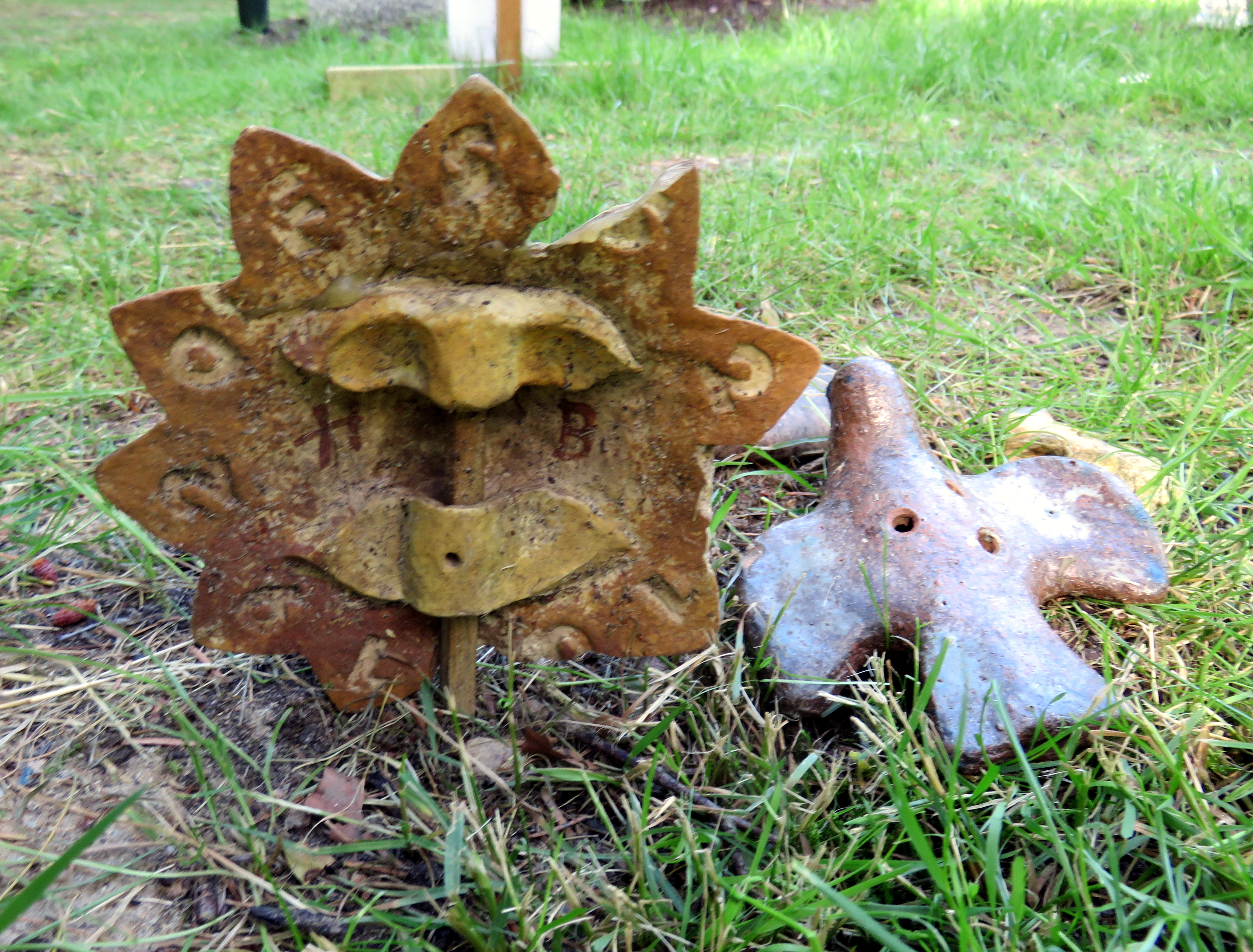 Urnengrabstätte des deutschen Grafikers, Zeichners, Malers, Ilustrators und Keramikers Holger Börnsen, Friedhof Ohlsdorf, Planquadrat BH61-2383 (südliche Kapelle 12), Zutand Juni 2020. Börnsen war insbesondere bekannt für die Motiv-Briefmarken, die er zwischen 1962 und 1992 für die Deutsche Bundespost entwarf.